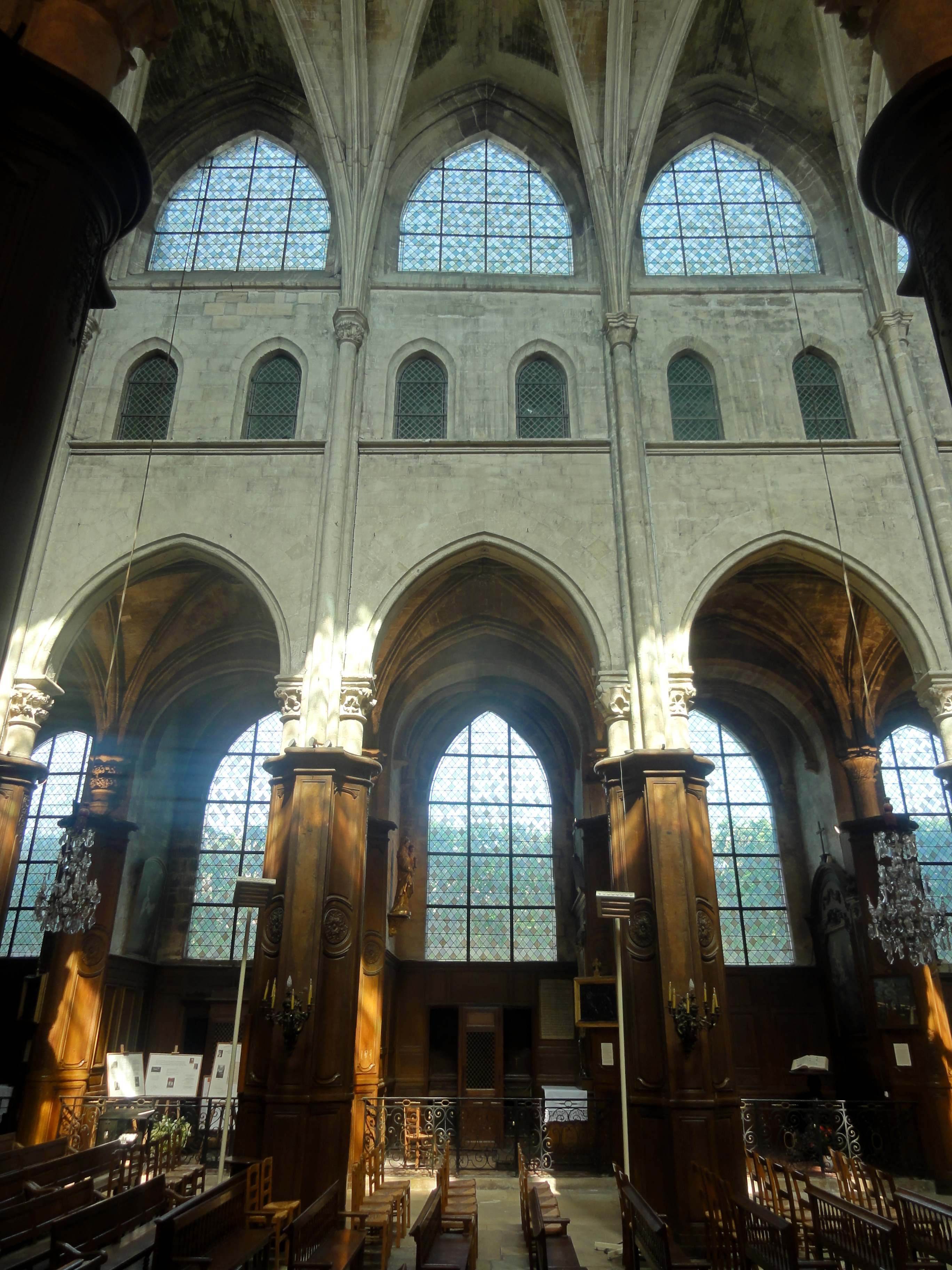 Nef de l'église - voir le titre du fichier.